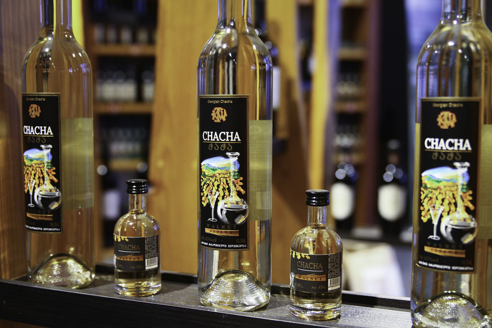 KTV wines, Georgia